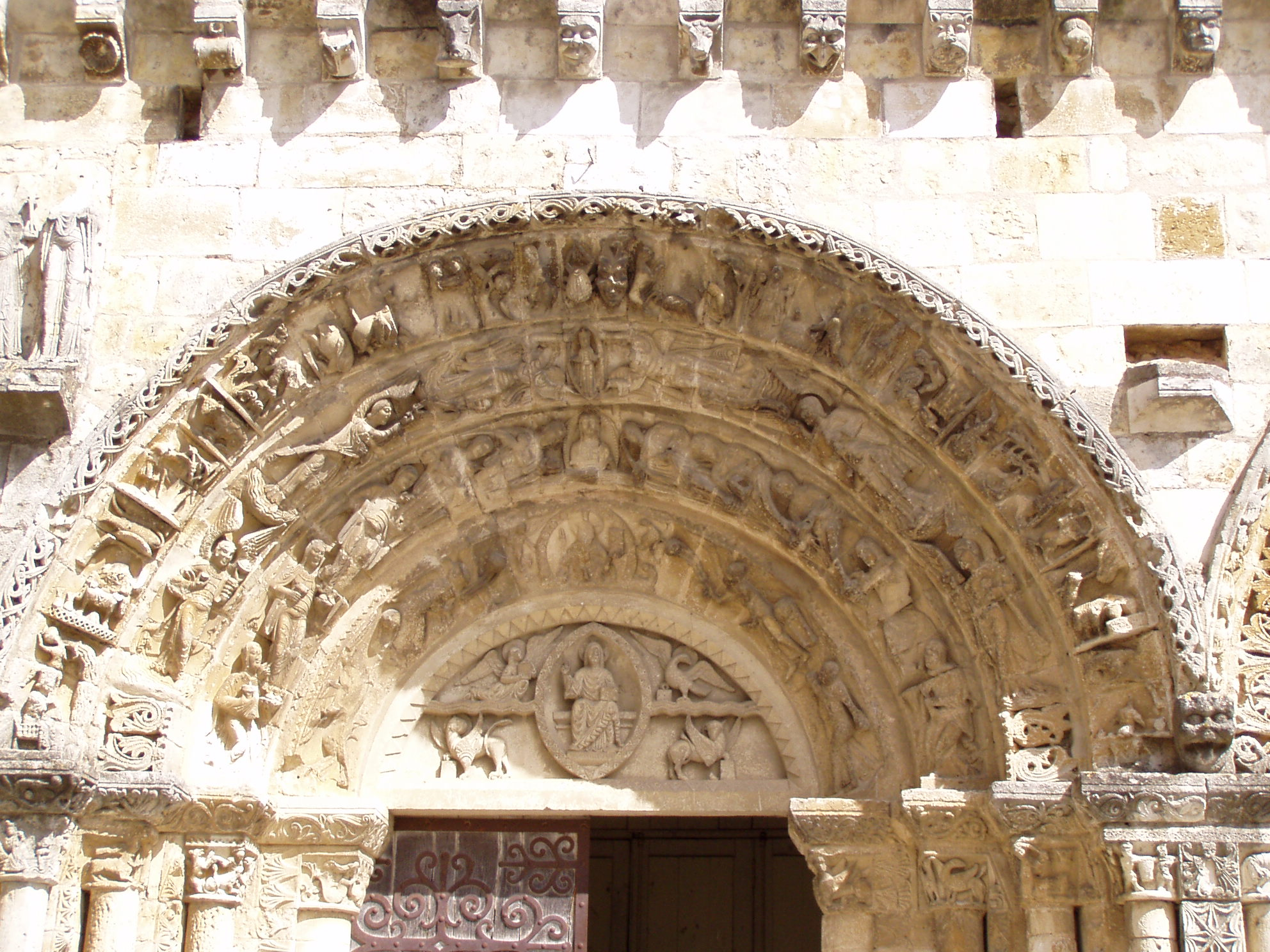 portail central de l'église Saint-Nicolas de Civray dans la Vienne (France)